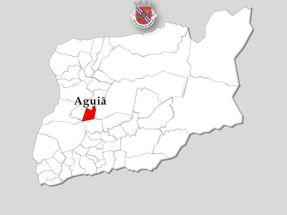 Censoa 1864/2011